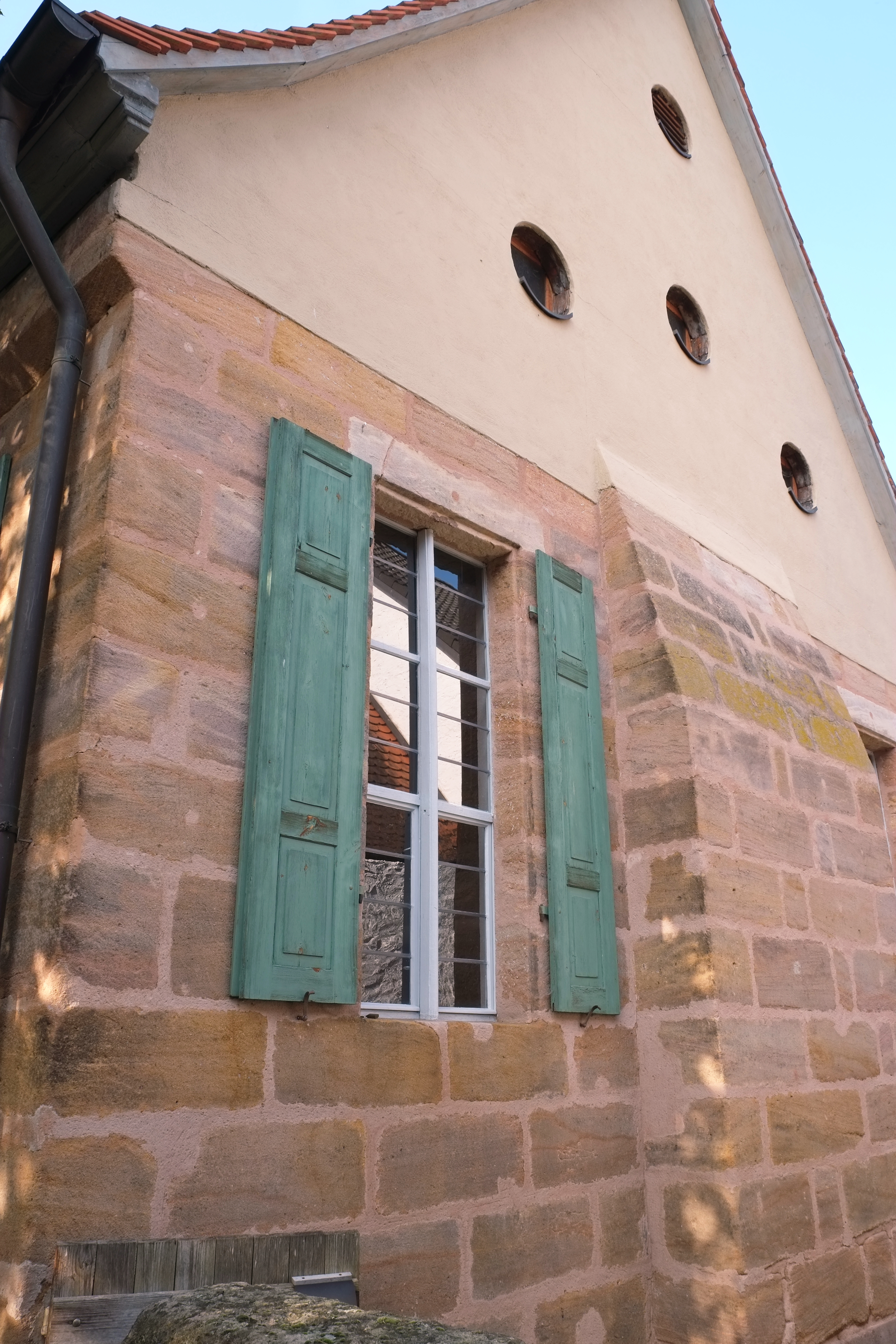 Synagoge in Georgensgmünd im Landkreis Roth (Bayern/Deutschland)